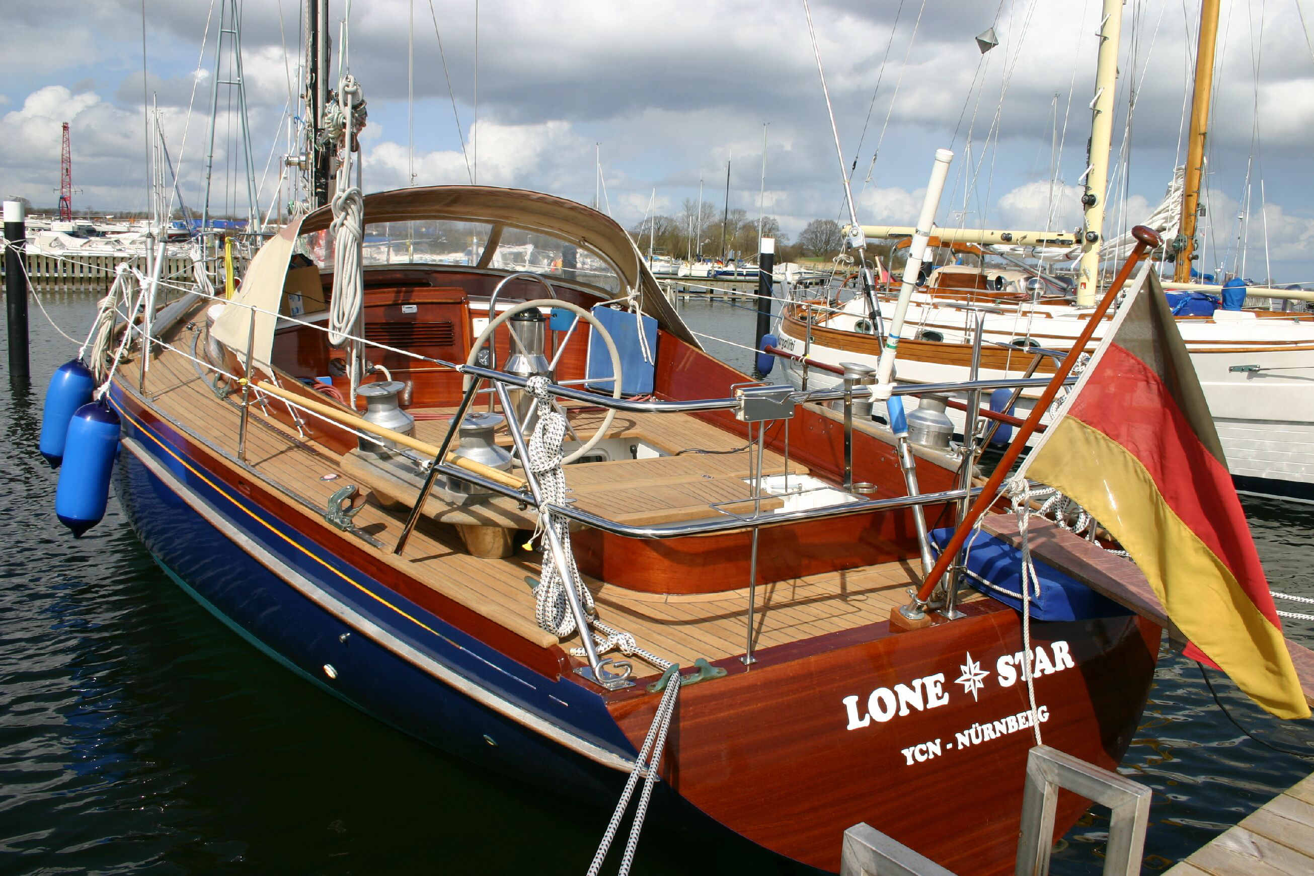 LoneStar 2005 in der Werft in Arnis